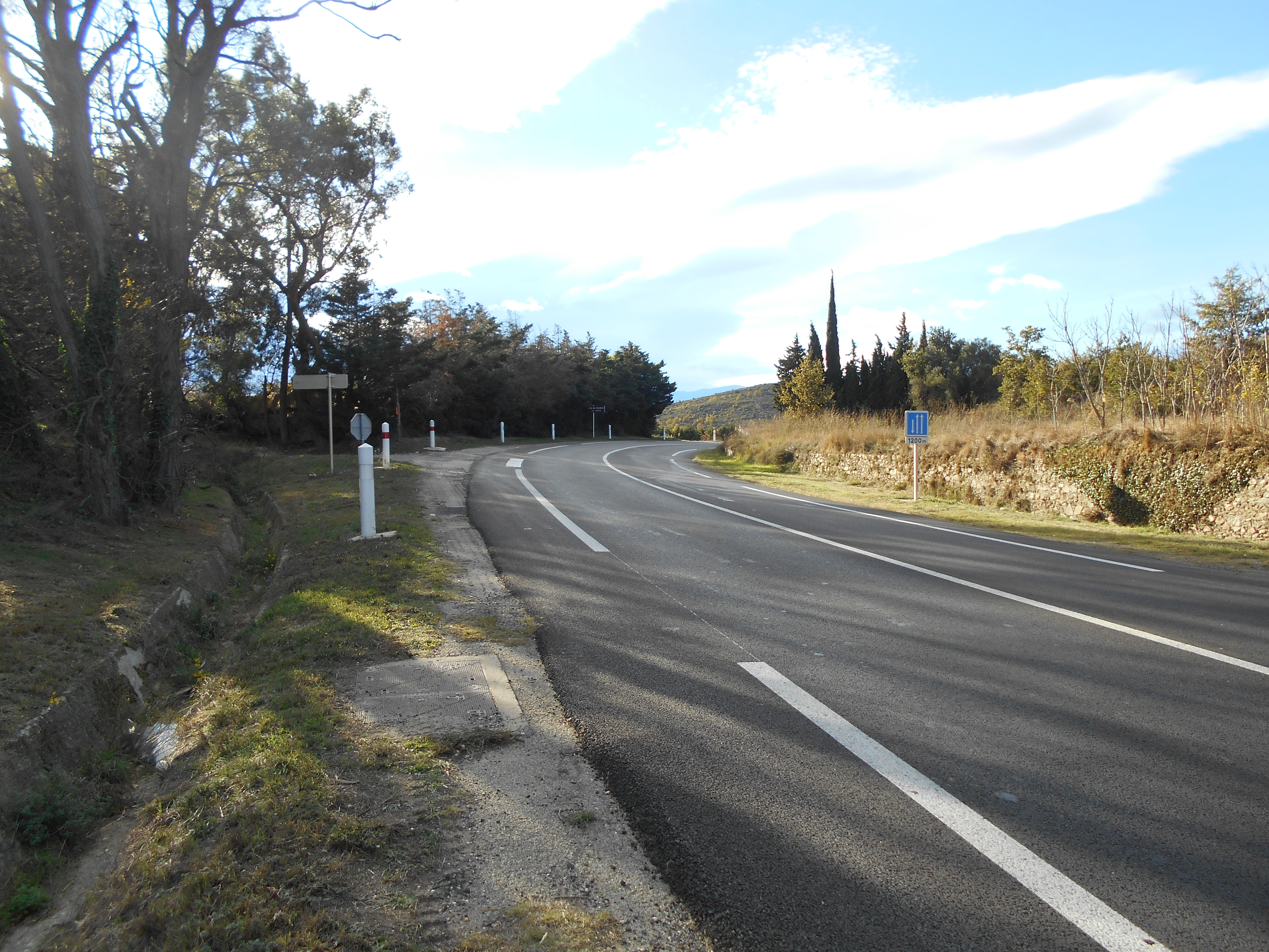 El Coll de Terranera, de Rodès (Conflent)